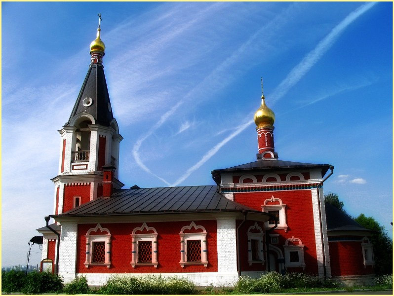 Храм святителя Николая в Сабурово